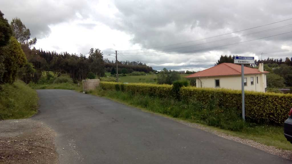 Vista de cerdeiras, Cabanas.